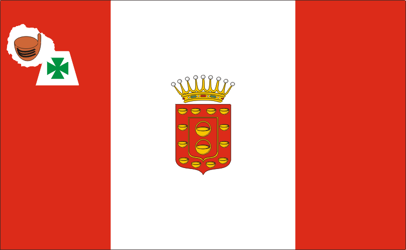 Bandera de La Gomera